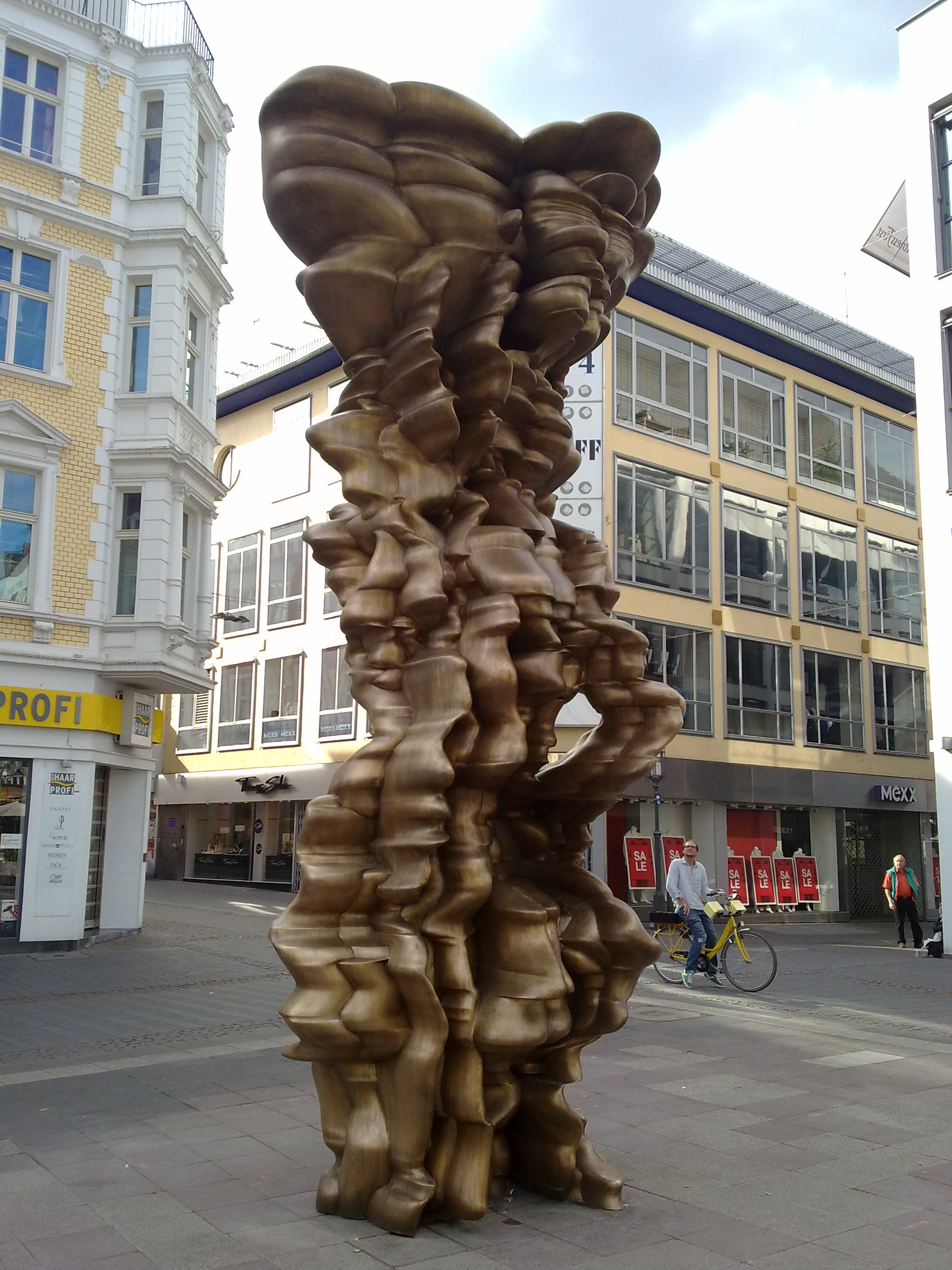 Tony Cragg: Mean Average (2014), 6 m hohe Bronzeplastik am Bonner Blumenmarkt (Remigiusplatz)